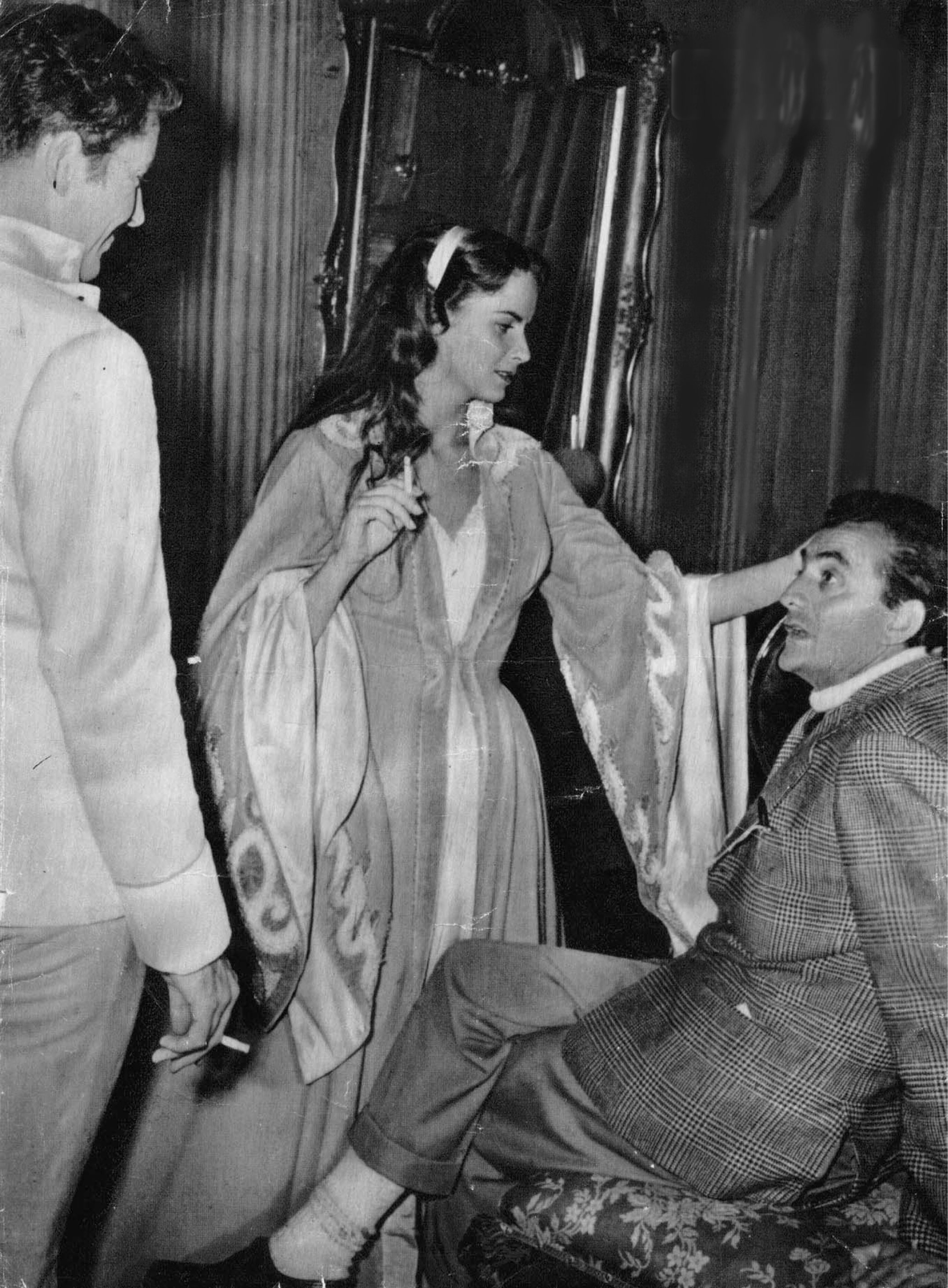 Granger+Vallli*+Visconti_set "Senso" 1953